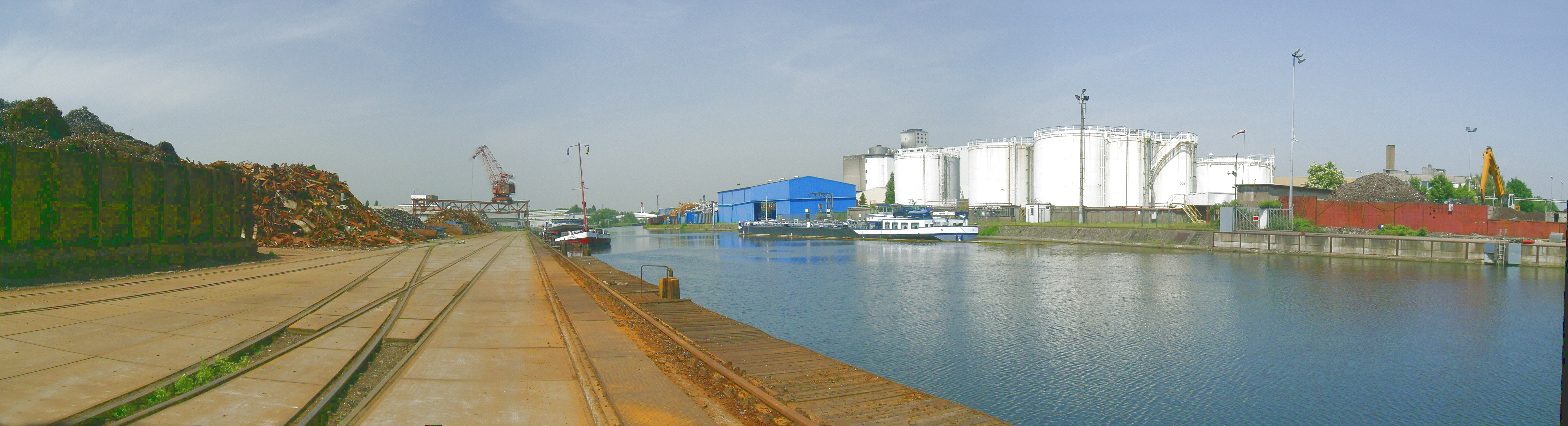 Rhein-Ruhr-Hafen, Südhafen